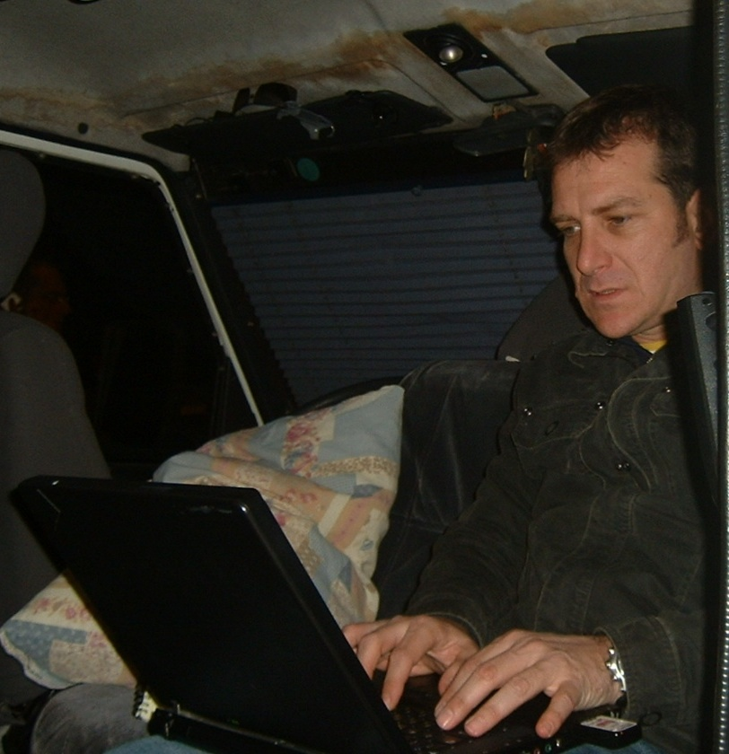 דני קושמרו בניידת שידור ליד קבוץ סעד בזמן מבצע עופרת יצוקה 7/1/09 רישיון נוצר על ידי משתמש:אביעד299